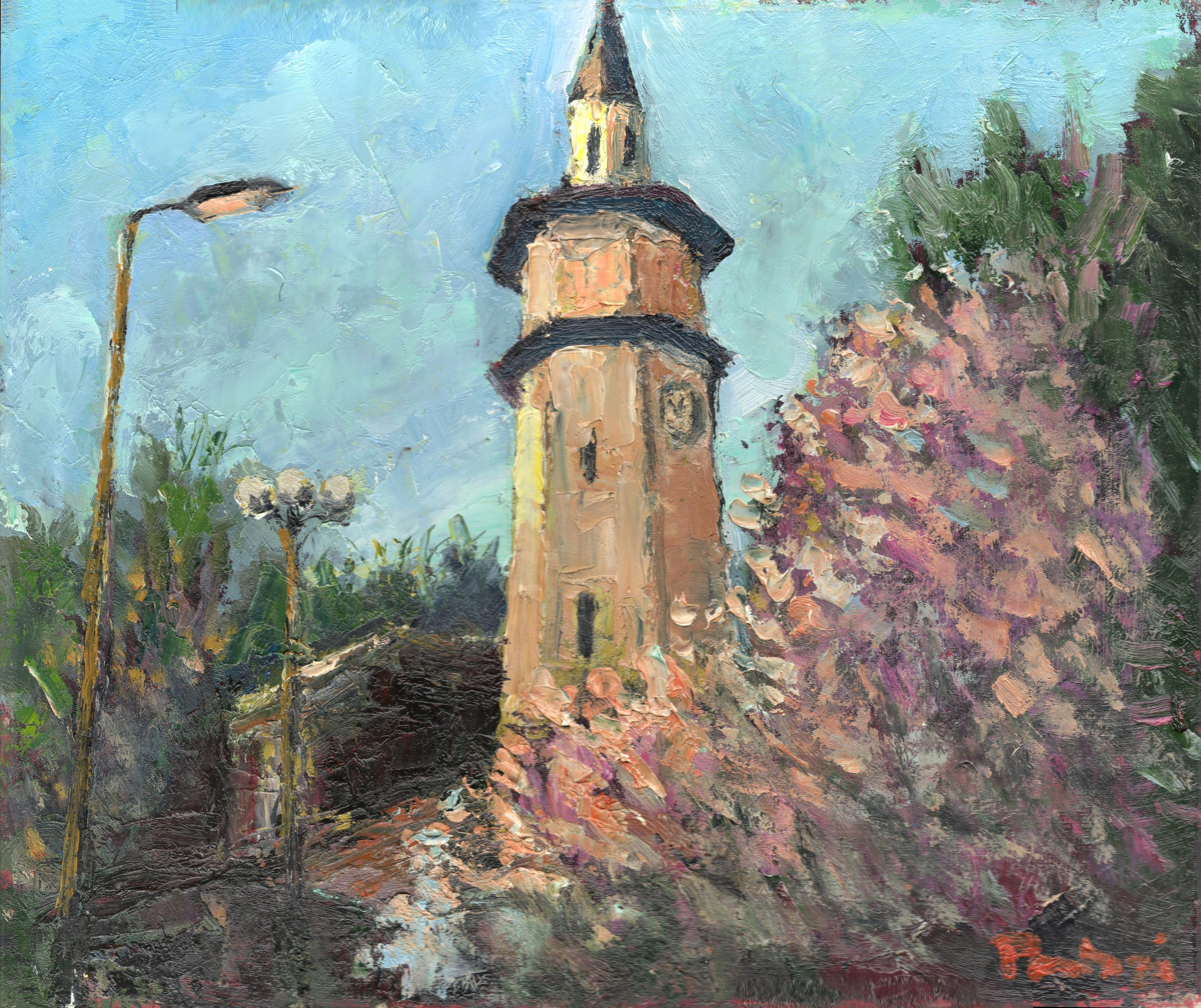 Peisaj "Turnul cu Ceas din Giurgiu", pictură realizată de Valeriu Pantazi, 2013.